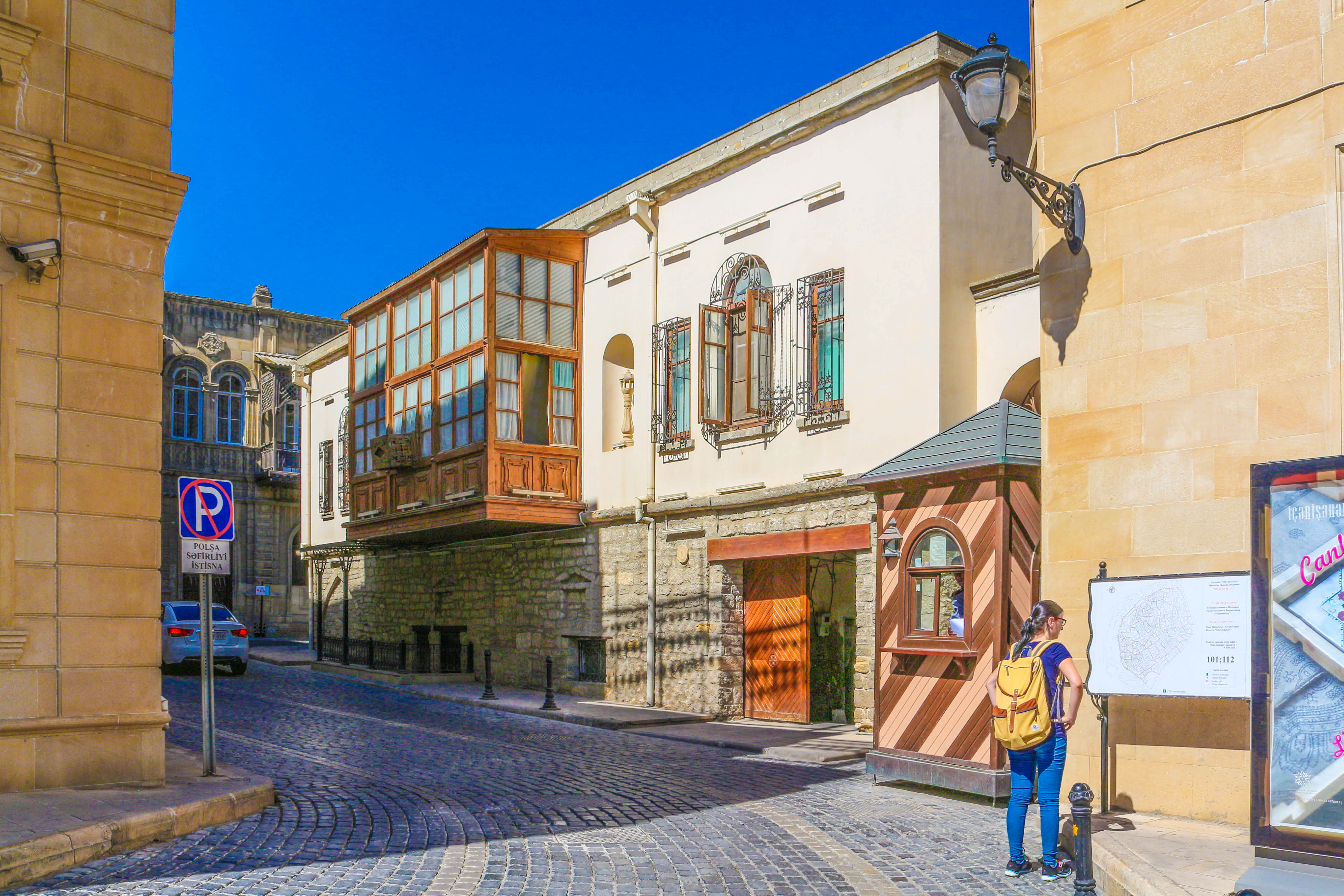 Yaşayış evi, A.Zeynallı küçəsi, 6